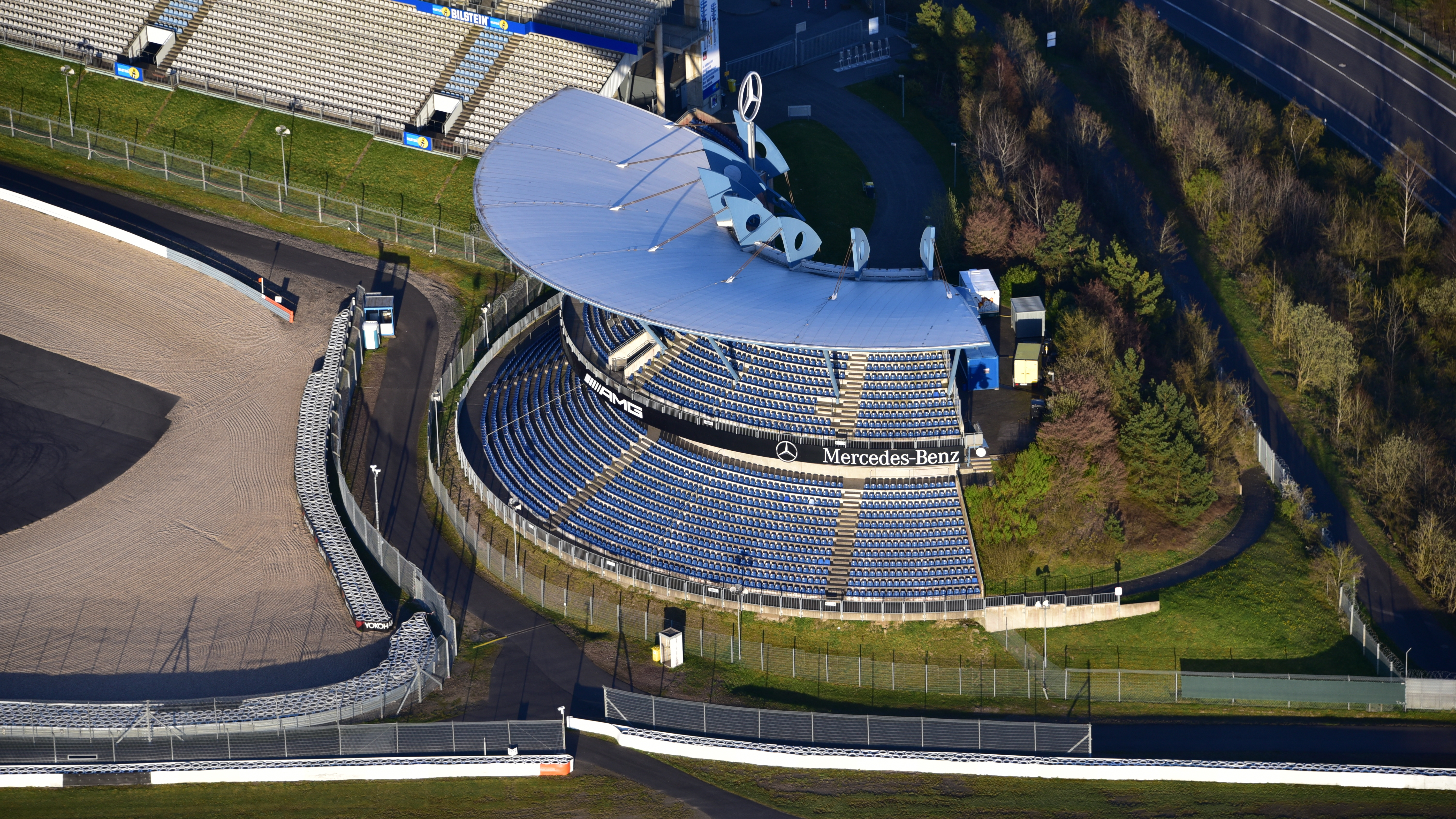 Nürburgring, Mercedesarena, Luftaufnahme (2016)